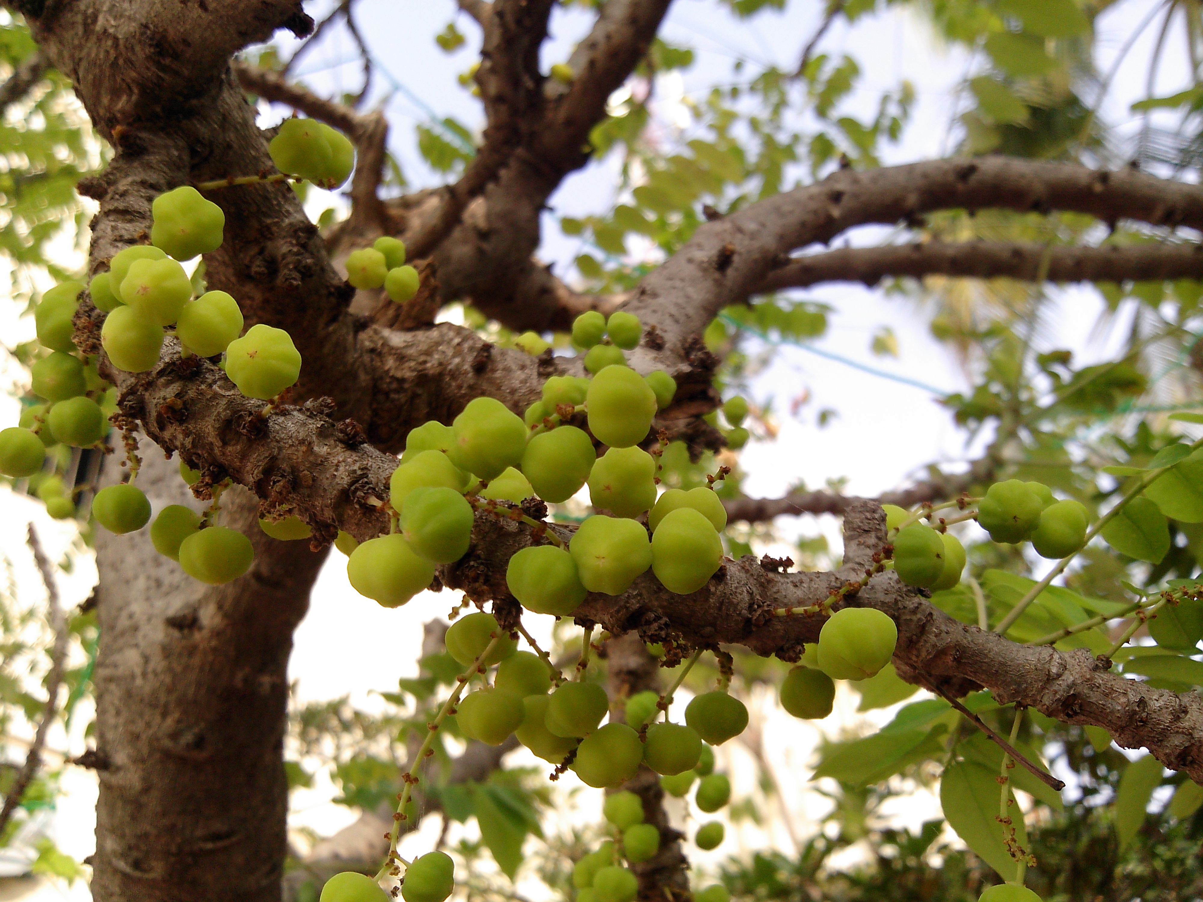 சேலத்து சிறு நெல்லி.சேலம், தமிழ் நாடு, இந்திய ஒன்றியம்.